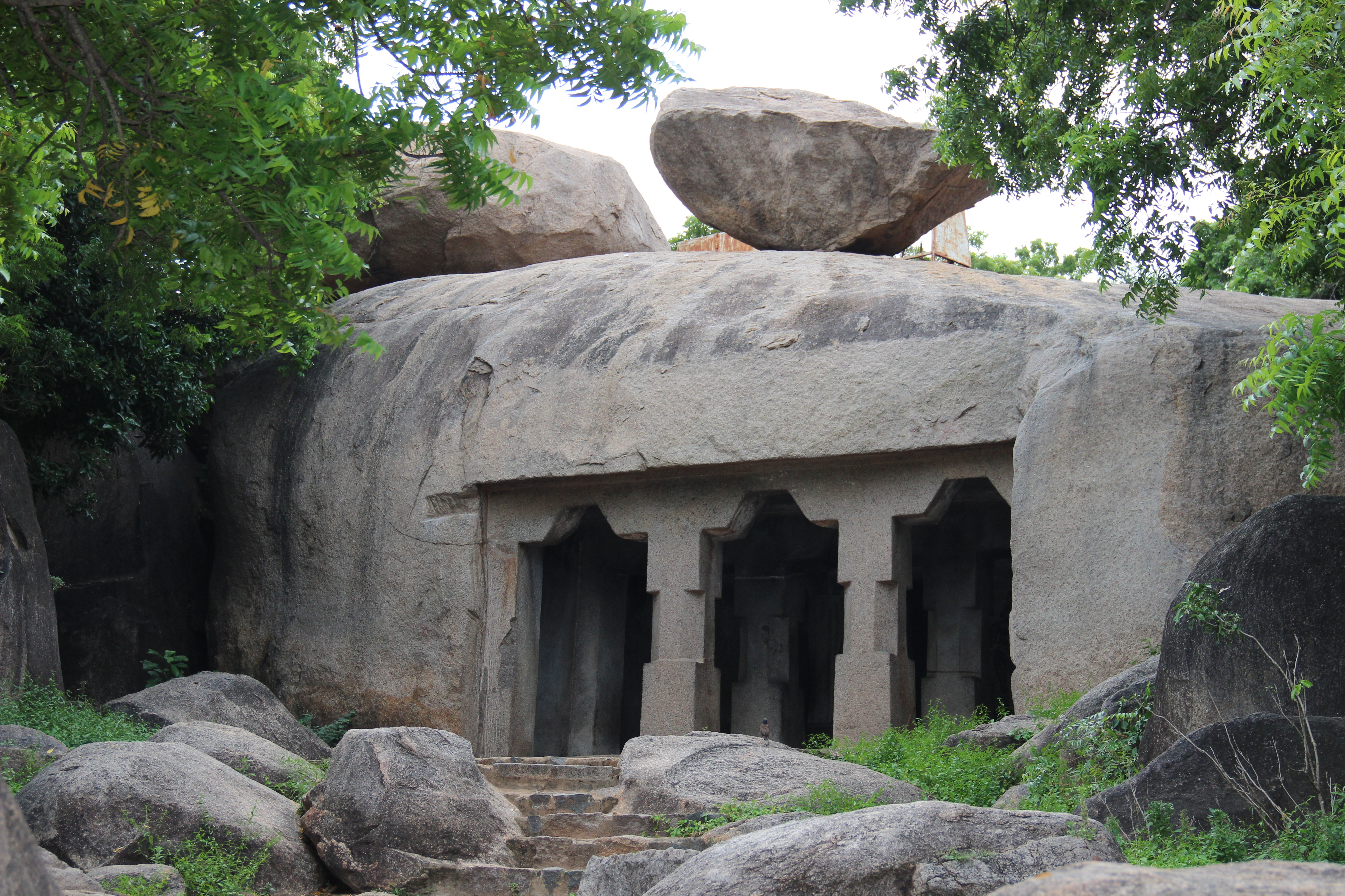 மகிசாமர்தினி குகை, மாமல்லபுரம்,தமிழ்நாடு, இந்திய ஒன்றியம். இந்திய தொல்லியல் ஆய்வெண்-N-TN-C47